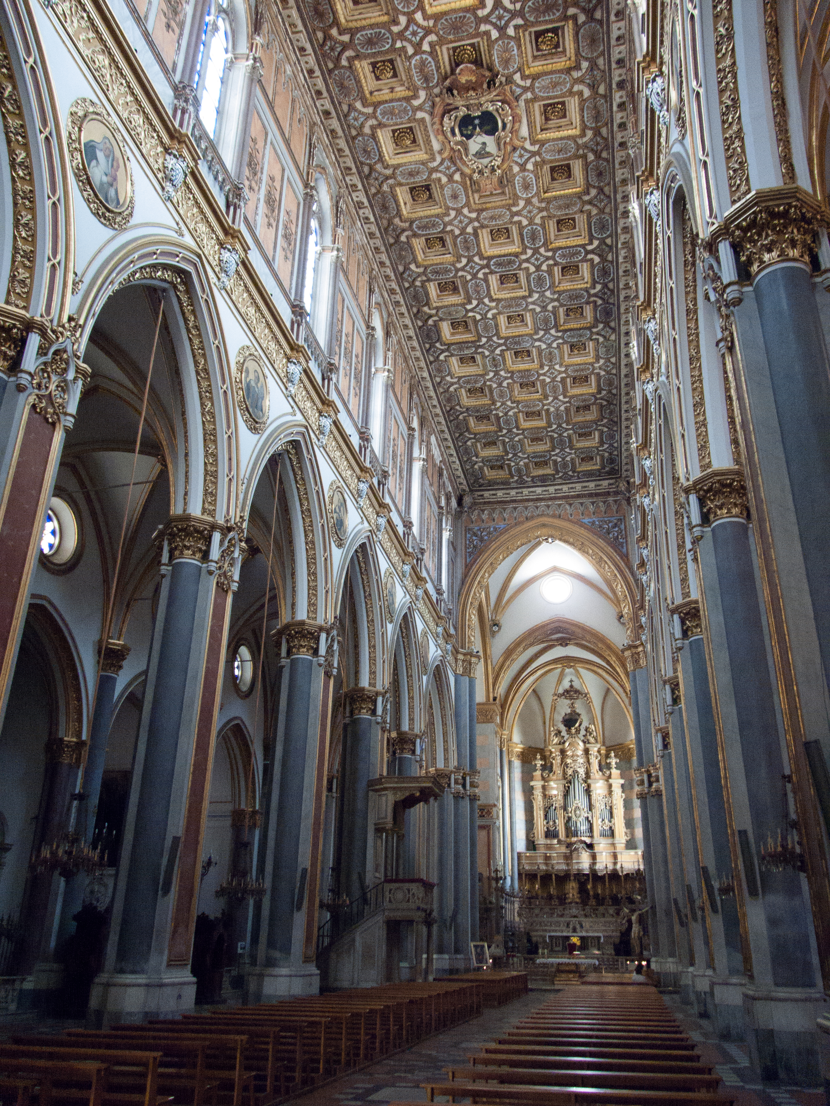 Chiesa di San Domenico Maggiore - Interno